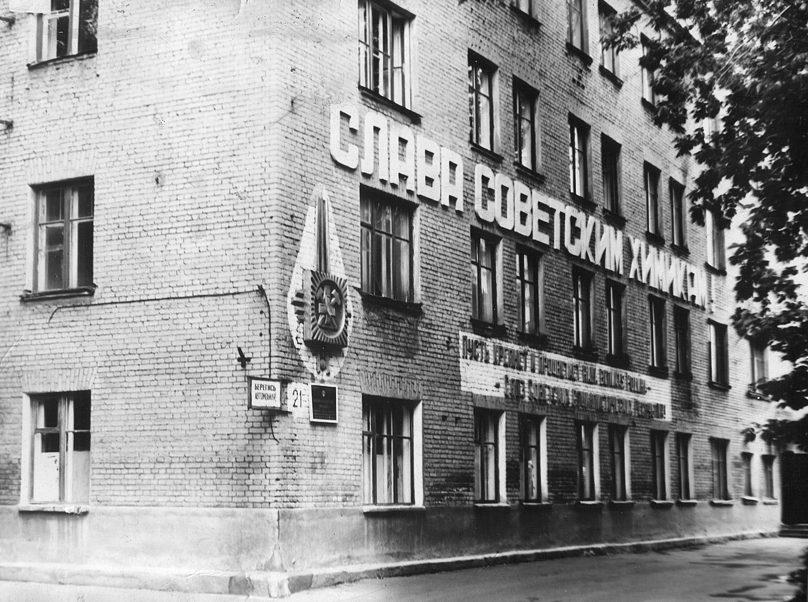 Здание НИПК (старая фотография).